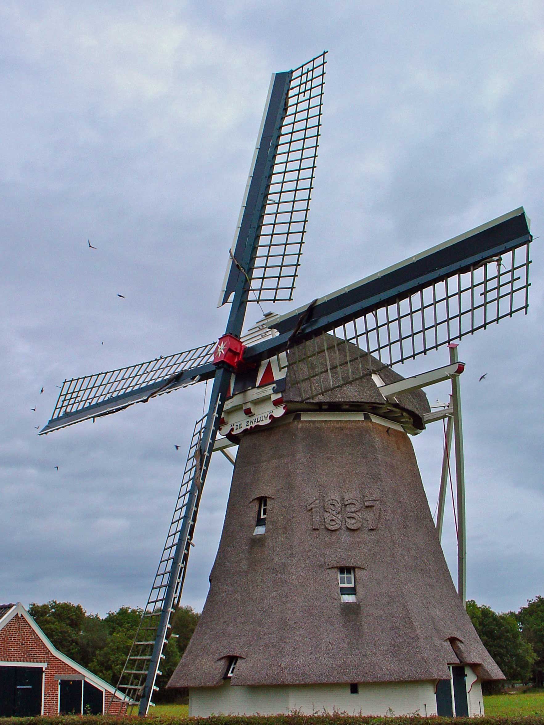 De Zwaluw nabij Oudemolen